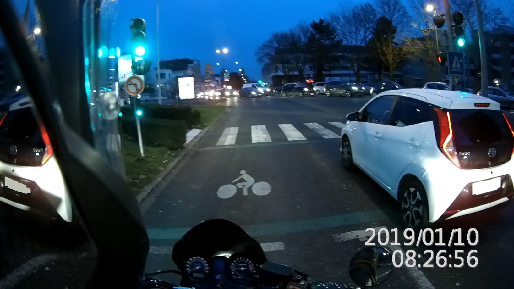 Image extraite d'un motovlog en ville. Vidéo horodatée